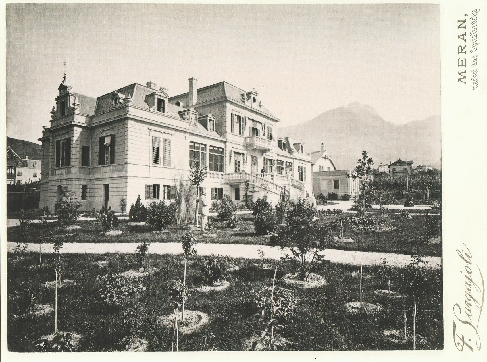 Villa Lindenburg in Meran